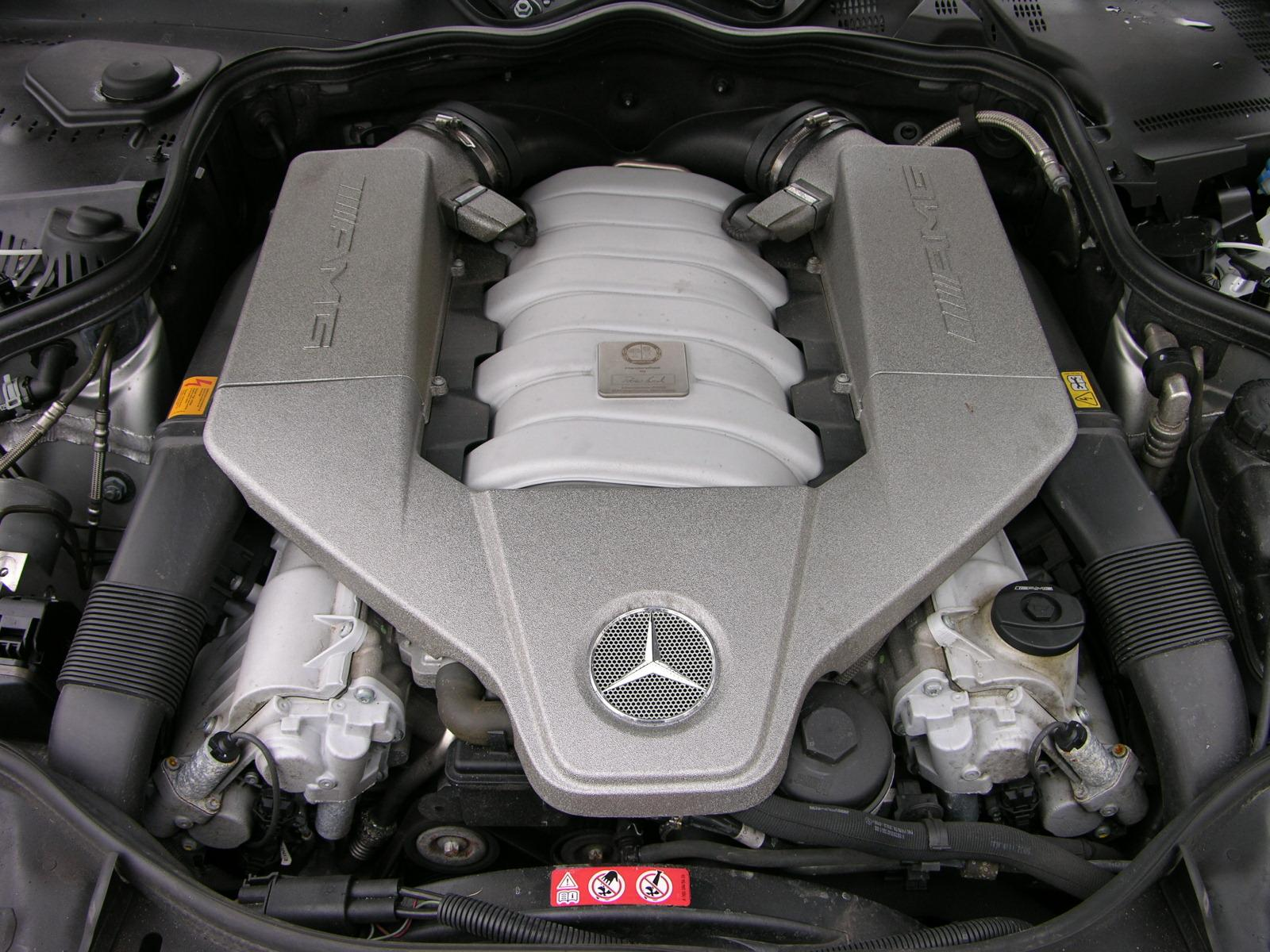 2006 Mercedes Benz E63 AMG